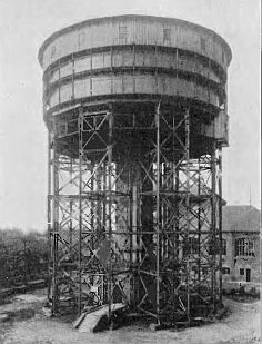 Zdjęcie przedstawiające wieżę wodociągową w Chropaczowie z początku XX wieku